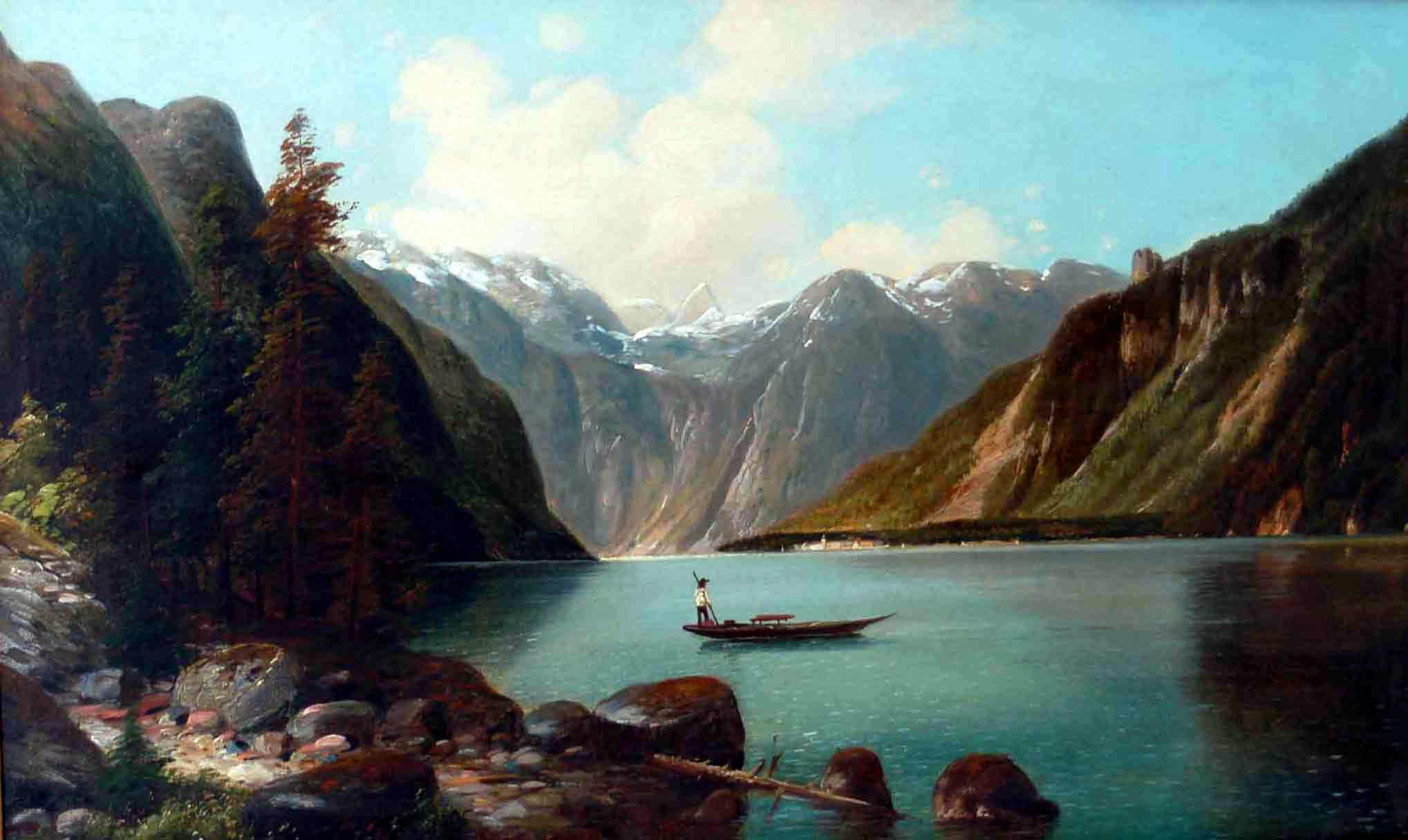 Königssee (Typische Königssee-Vedute des 19. Jahrhunderts)